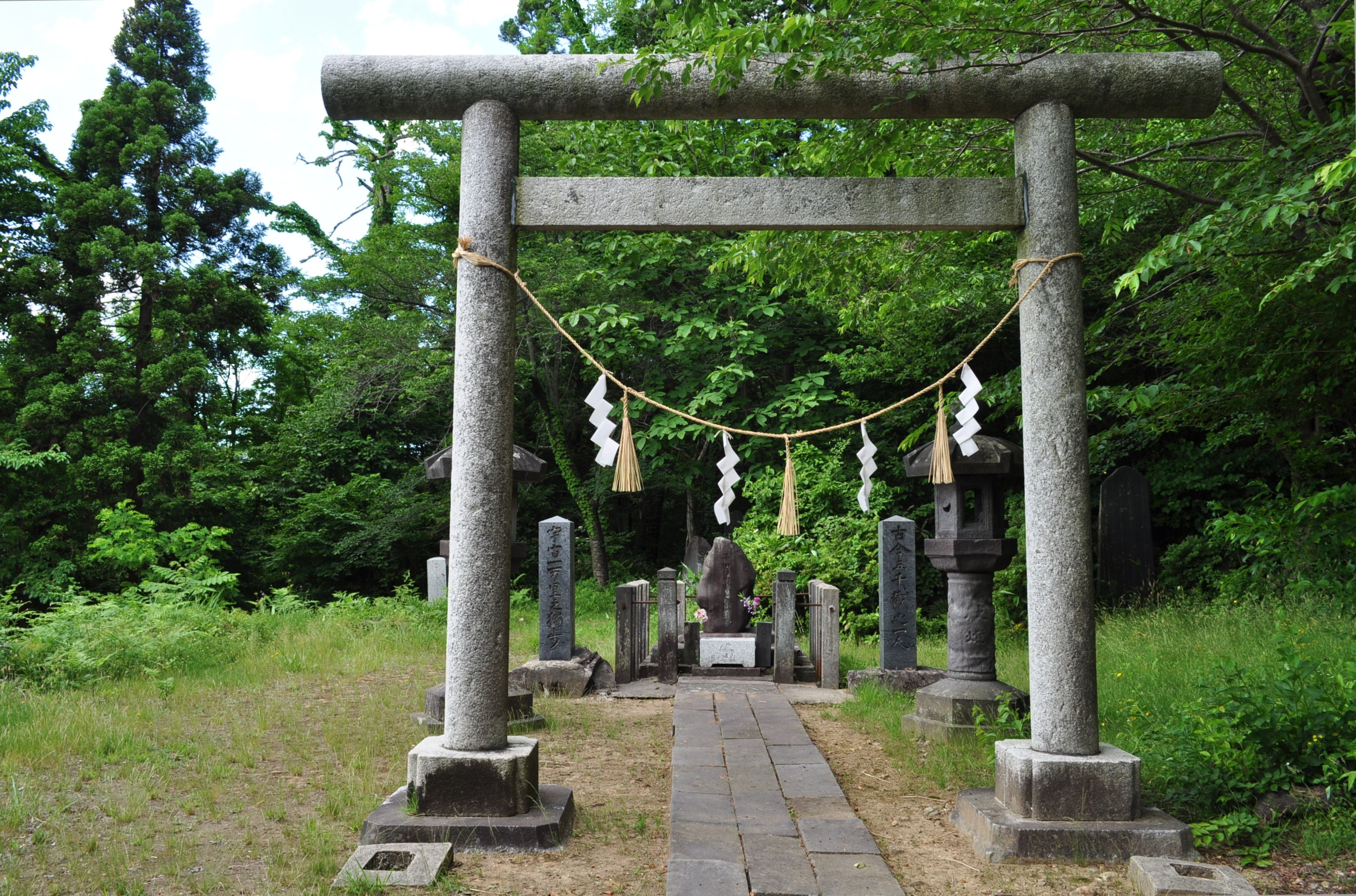 秋田市手形字大沢の旧正洞院にある平田篤胤の墓碑